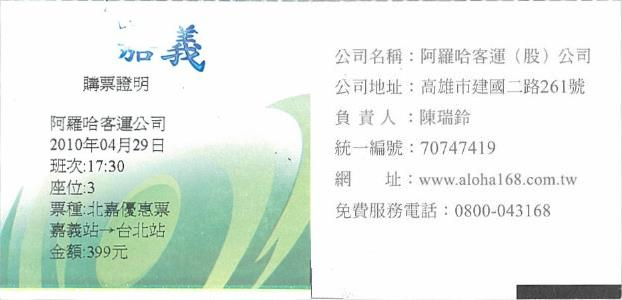 中文（台灣）: 阿羅哈客運購票證明，實長59.5mm，實寬57.0mm；左為正面，右為背面。